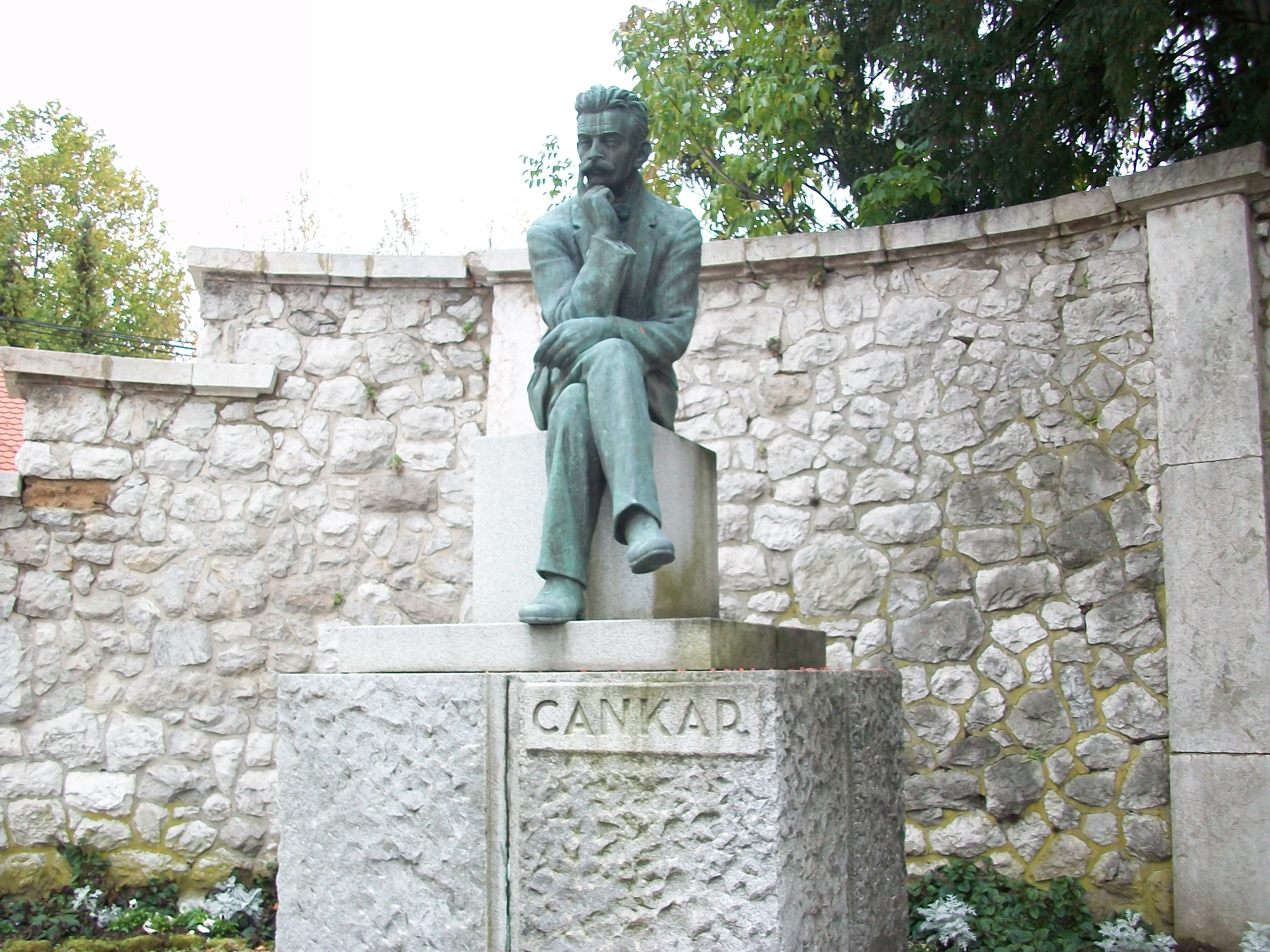 Spomenik Ivana Cankarja na Vrhniki, delo kiparja Ivana Jurkoviča iz leta 1930.